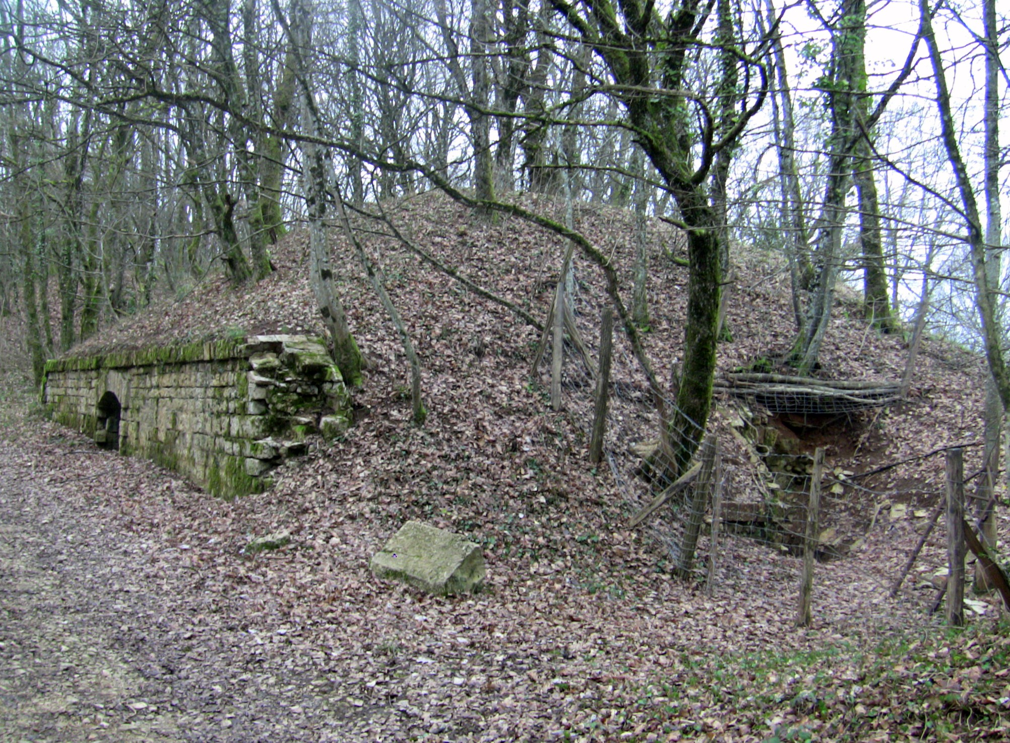 La traverse-abri II de la batterie ouest du fort de Planoise, à Besançon (Doubs, France).